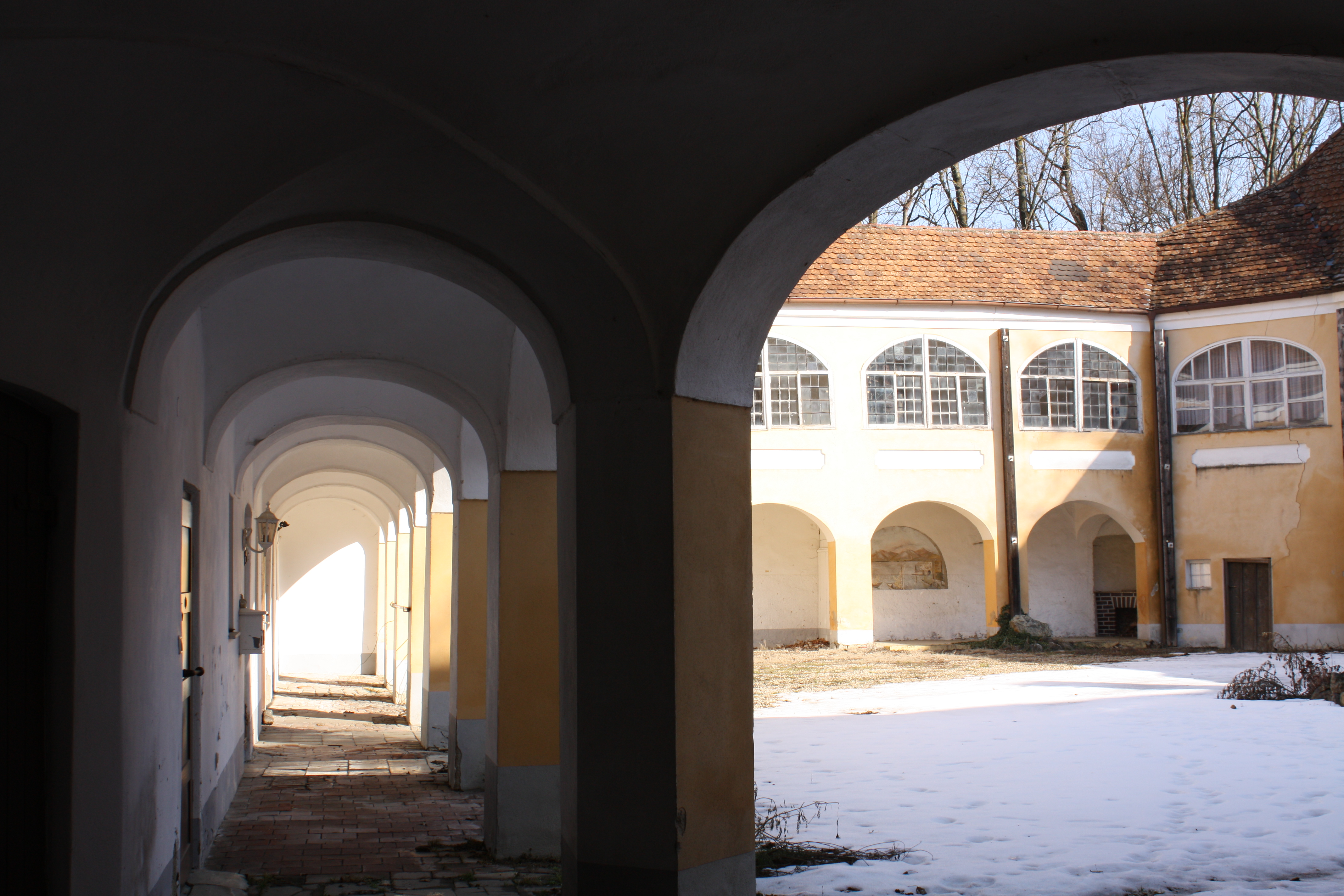 Arkaden Schloss Geltolfing